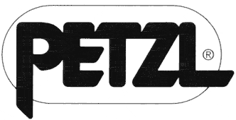 Petzl Logo